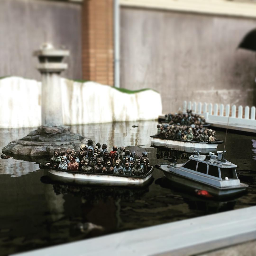 Dismaland